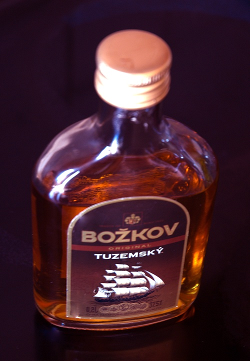 Rum božskovský tuzemský 0,25l (placka)